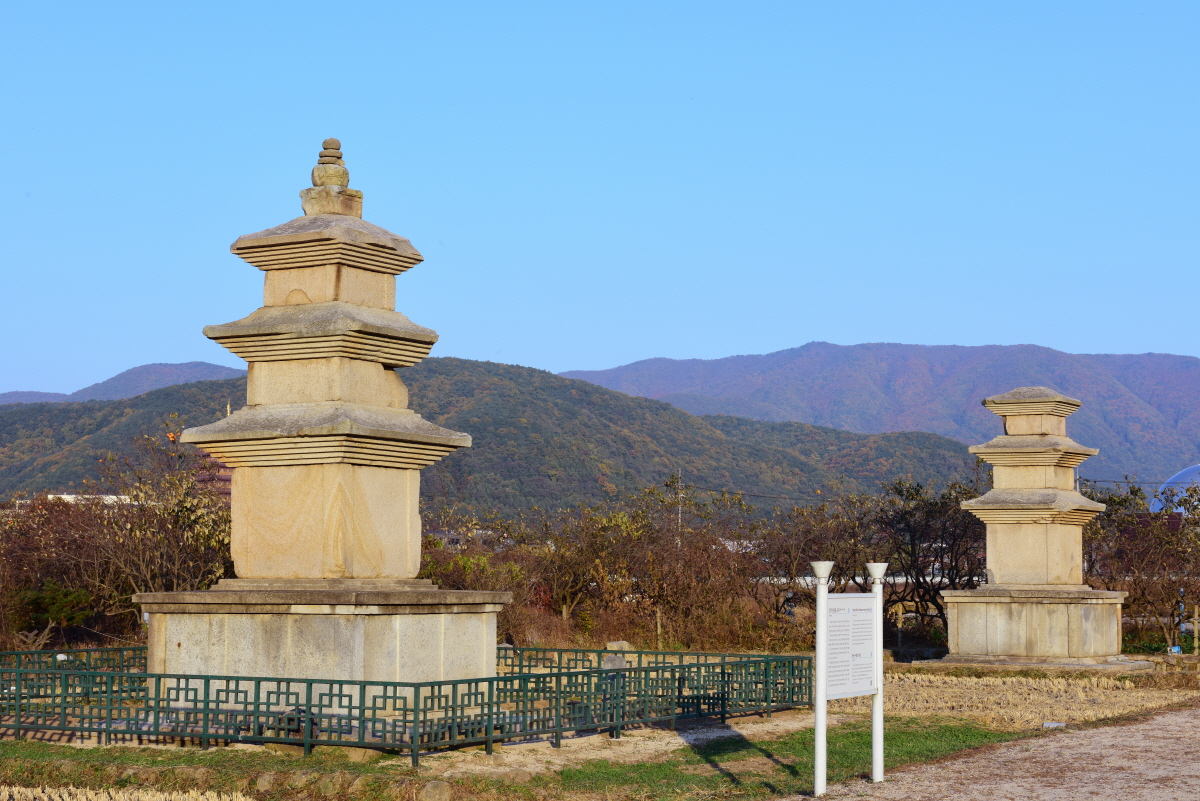 보물 제168호 경주 천군동 동ㆍ서 삼층석탑 (慶州 千軍洞 東ㆍ西 三層石塔)